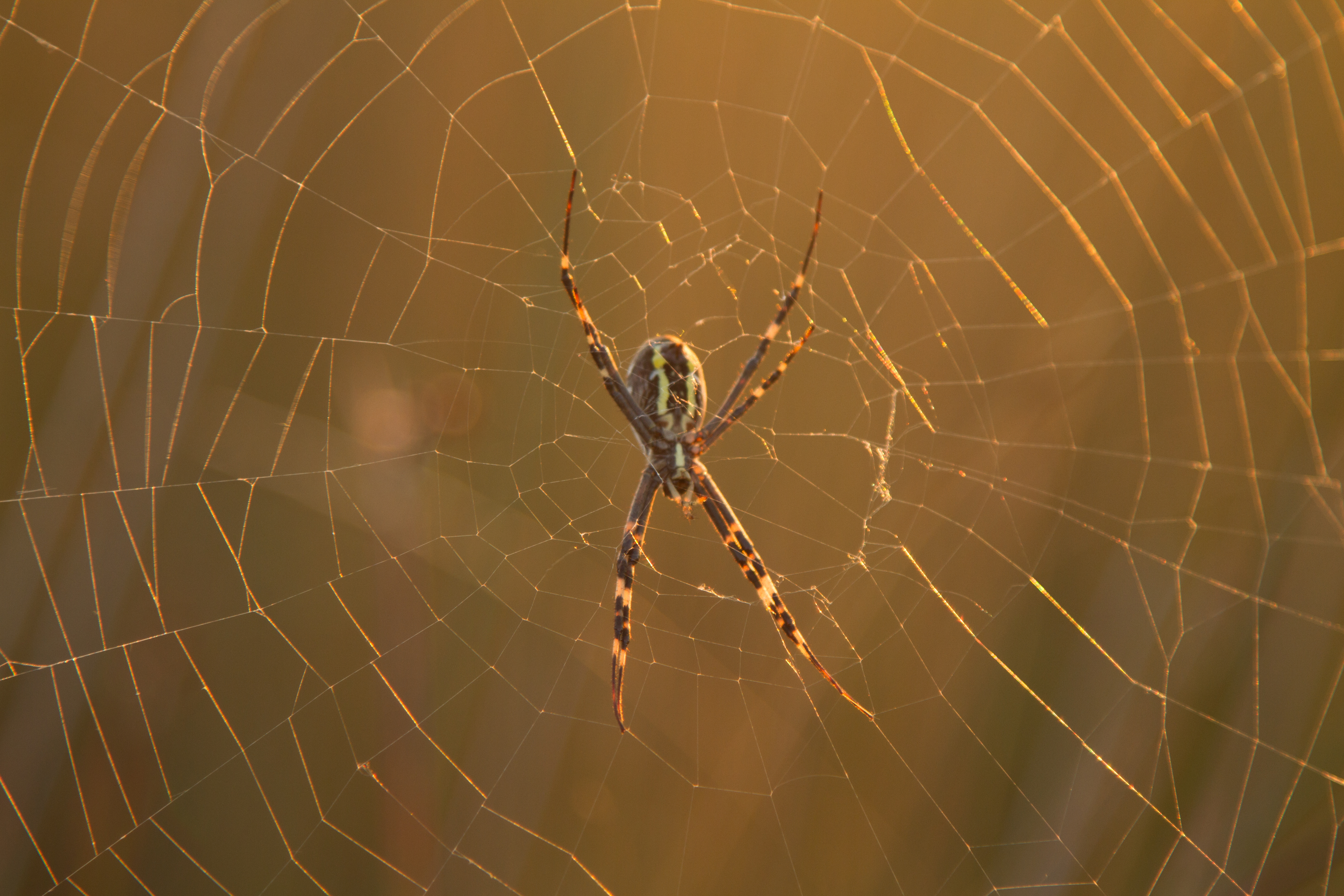 Знято під час експедиції на о. Джарилгач This photo/video of Dzharylhach was taken during Wikiexpedition to Dzharylhach supported by Wikimedia Ukraine. You can see all photographs in category Category:Wikiexpedition to Dzharylhach. English | українська | +/−